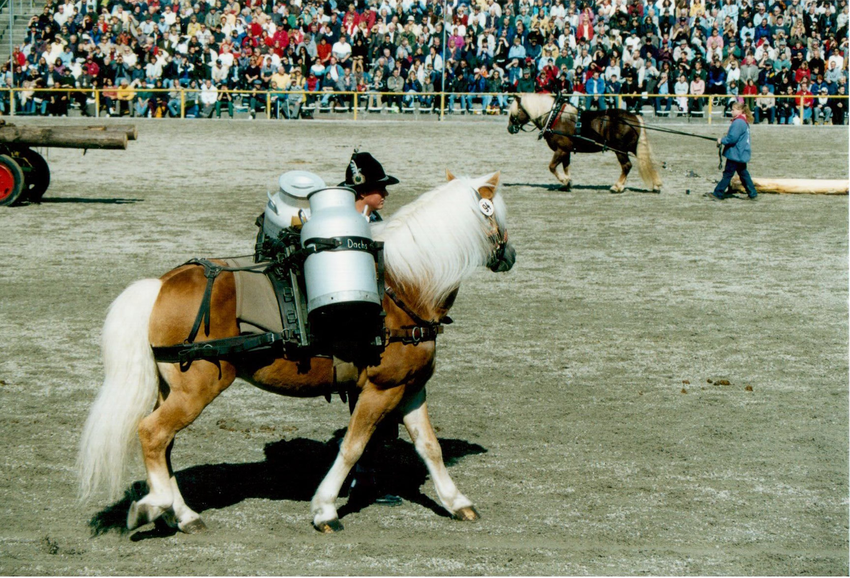 Schwarzwälder bei der Hengstparade in auf dem Haupt- und Landgestüt Marbach in Gomadingen.